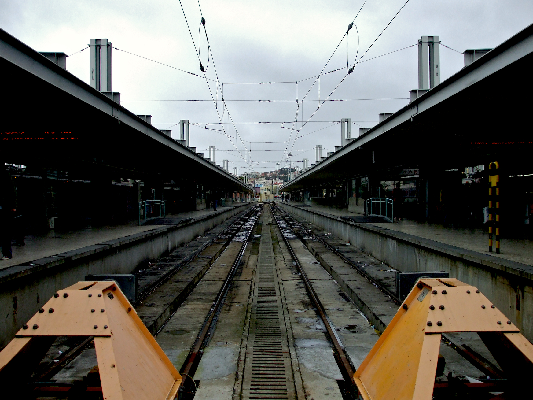 Tipo: E [Estação] Local: Lisboa [Linha de Cascais, PK 0,0] Data e hora: 4 de Março de 2008 [13h01]